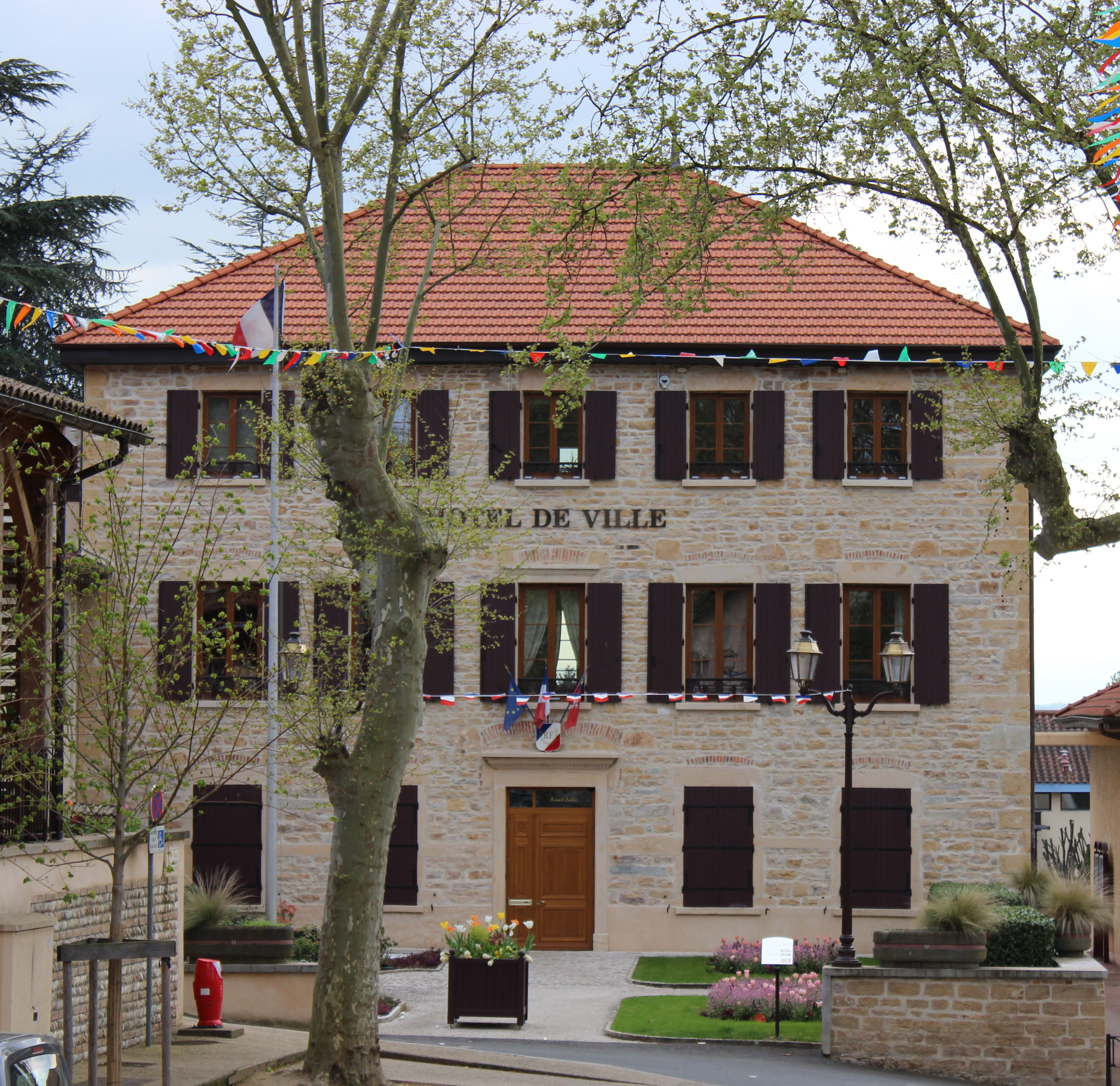 Hôte de Ville de Genay.